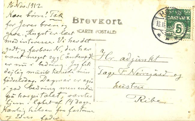 Brev fra Højskoleforstander Jens Nørregård til dennes søn Tage Nørregård.